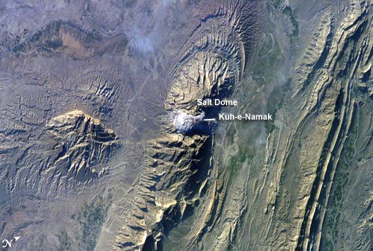 کوه جاشک